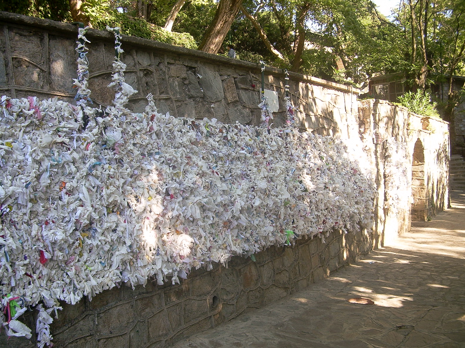 Klagemauer in Meryemana, Türkei